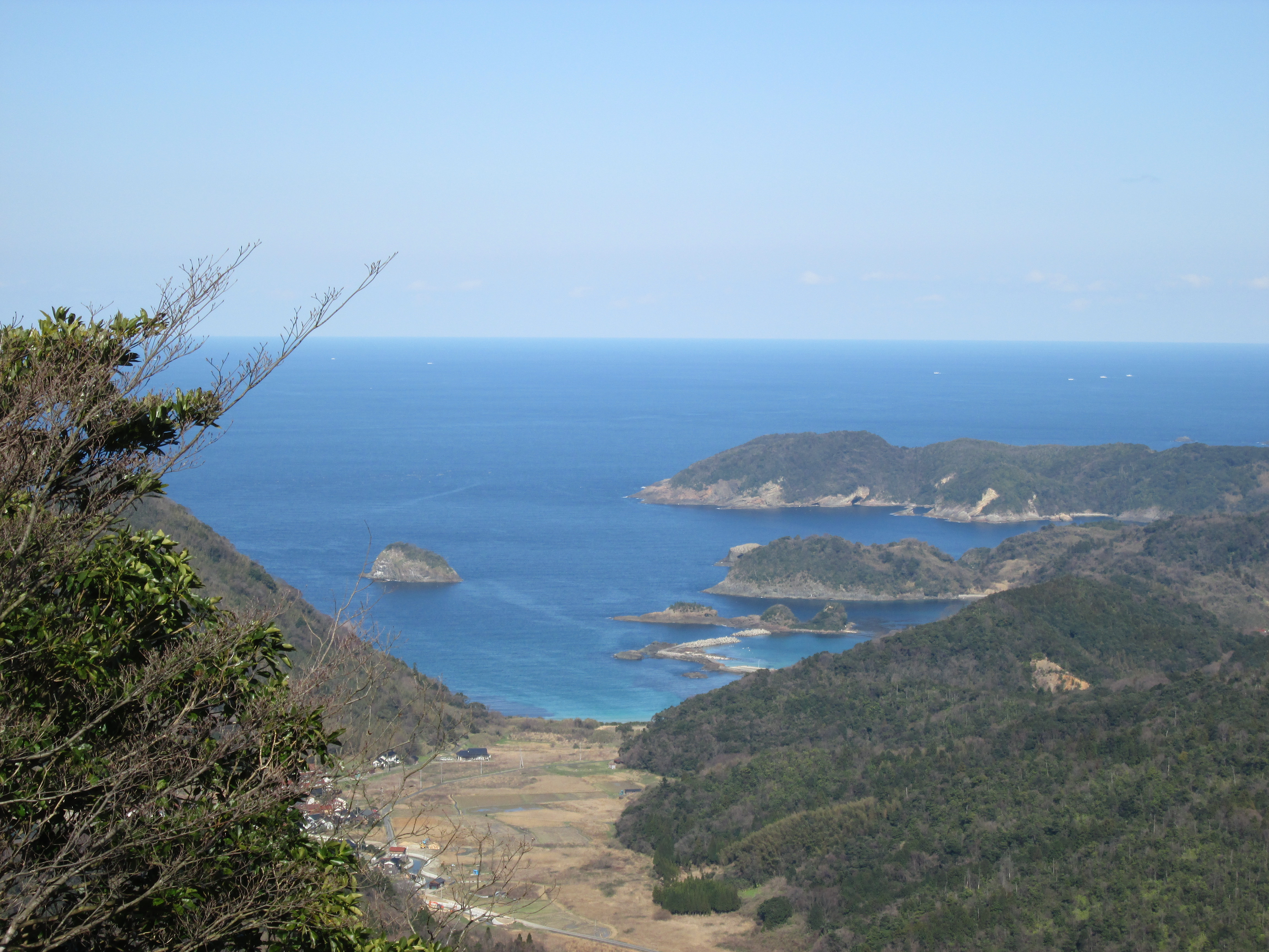 忠山の山頂から望む千酌湾